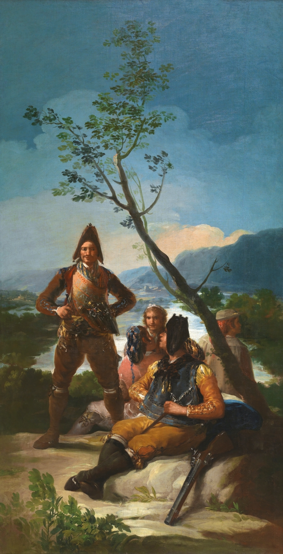 Cartones para tapices.